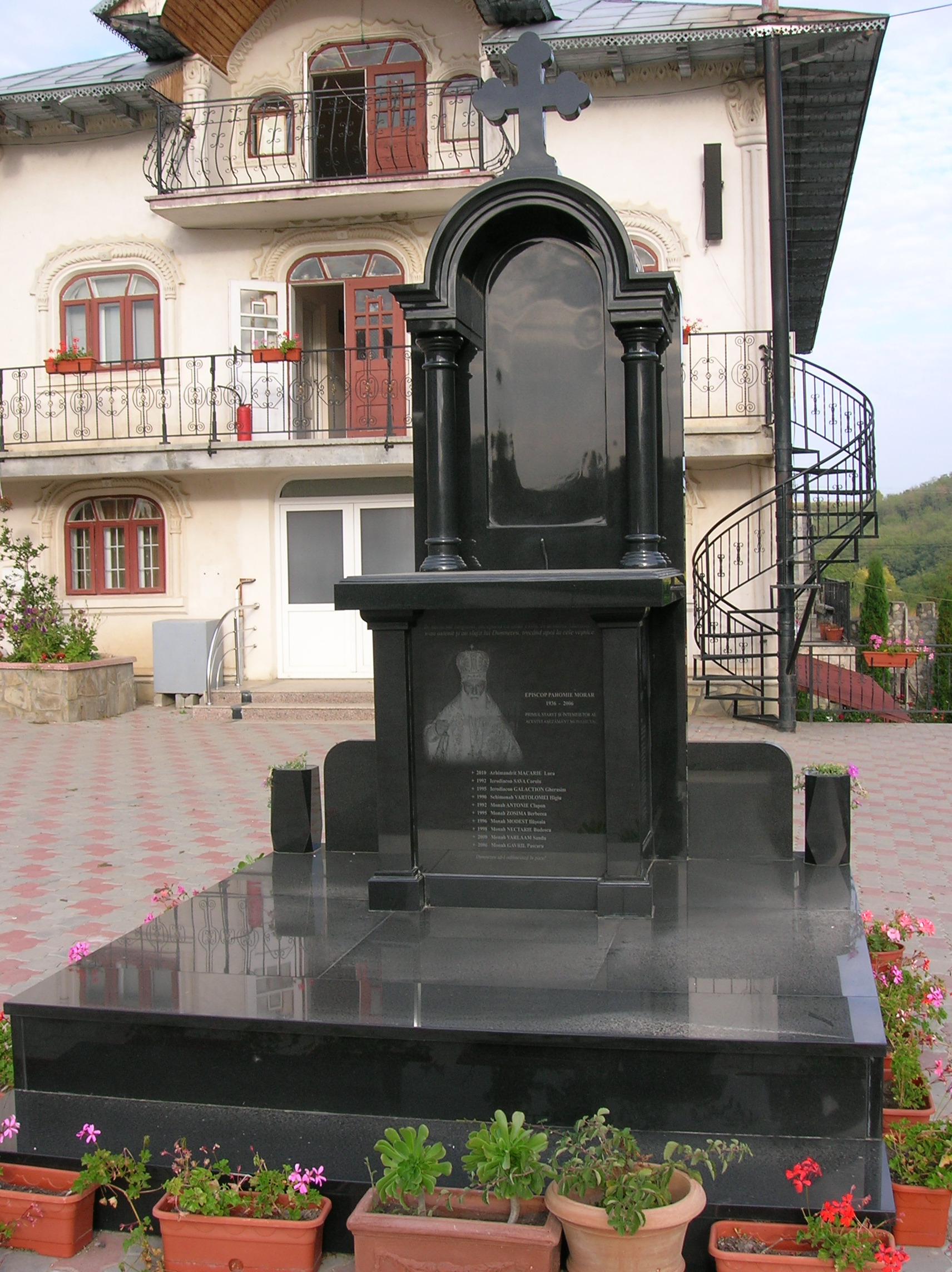 Comuna Valea Seacă Bacău - Satul Cucova - Mănăstirea Sfânta Treime (stil vechi) - Obeliscul ridicat în memoria revoltei din 1935